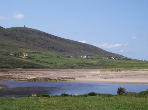 Glengad